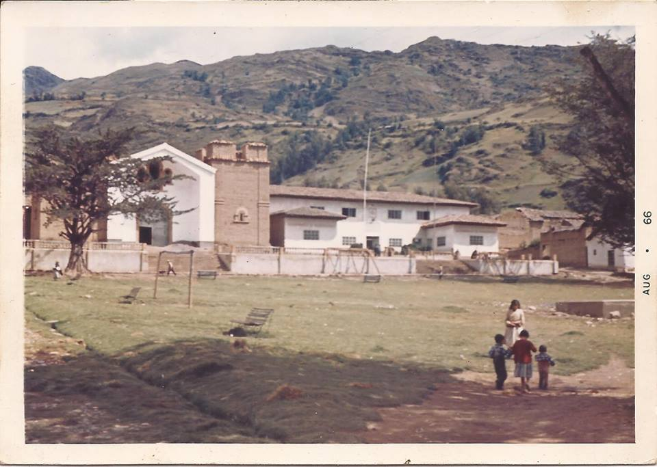 Plaza de Chacas en 1966, nótese la iglesia. El municipio de Chacas liderado por Ludovico Amez Hoke, construía las nuevas torres del templo. Estas solo permanecieron en pie 2 años, ya que no pudieron soportar el terremoto de 1970.